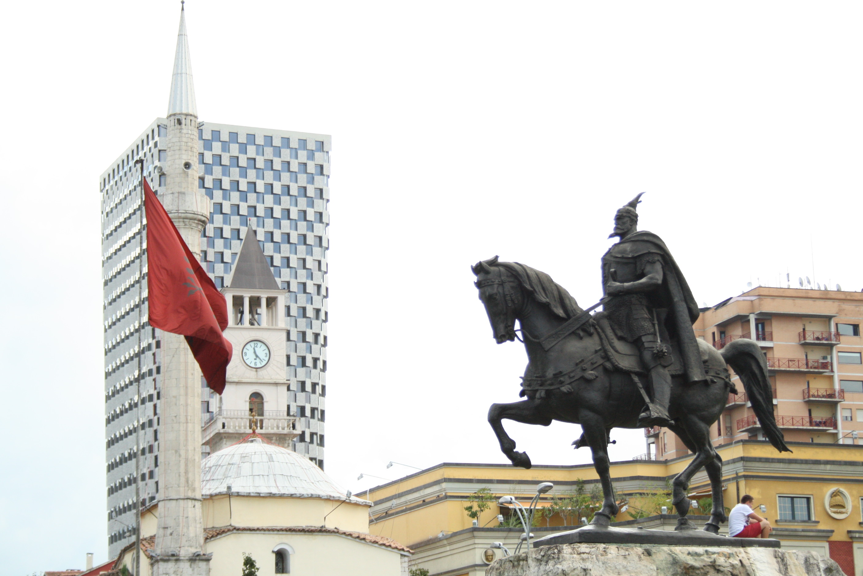 Tirana, Piazza Skanderbeg